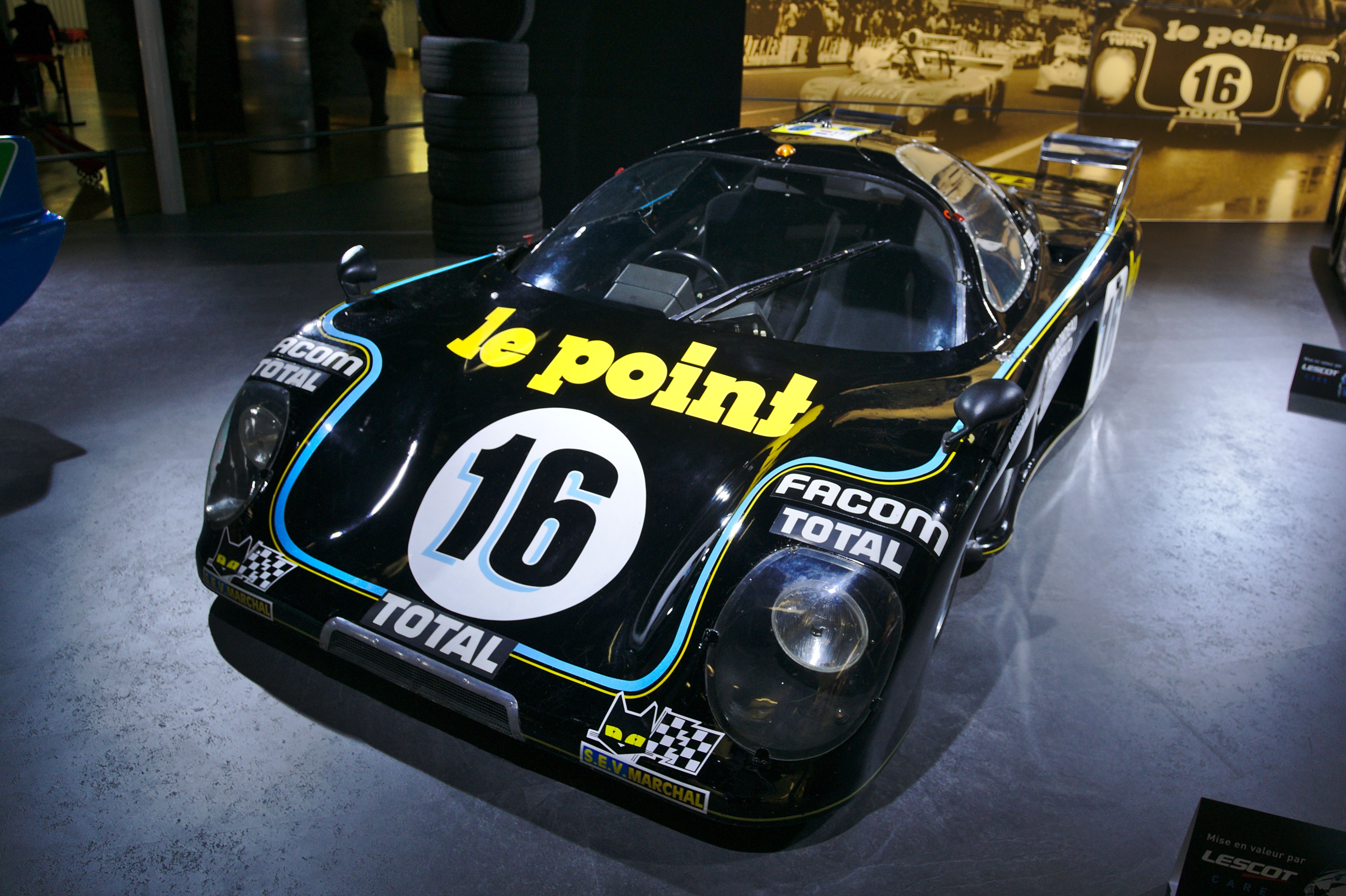 Salon de l'auto de Genève 2014 - 20140305 - Expo Le Mans